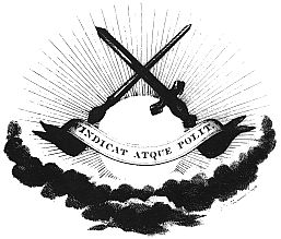 Oude wapen van het Groninger Studenten Corps, waarschijnlijk ontworpen door Sir Lawrence Alma Tadema (archieftitel Groninger Archieven: Vindicat Atque Polit (1), 1815-1943 (1969), toegangsnummer 467.